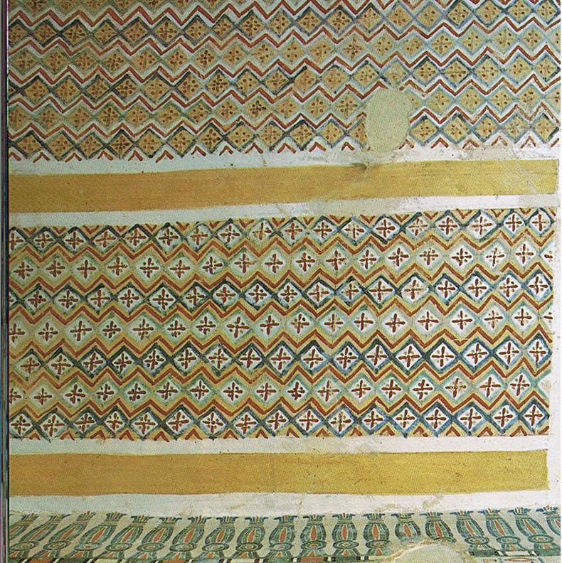 Grabornamentik